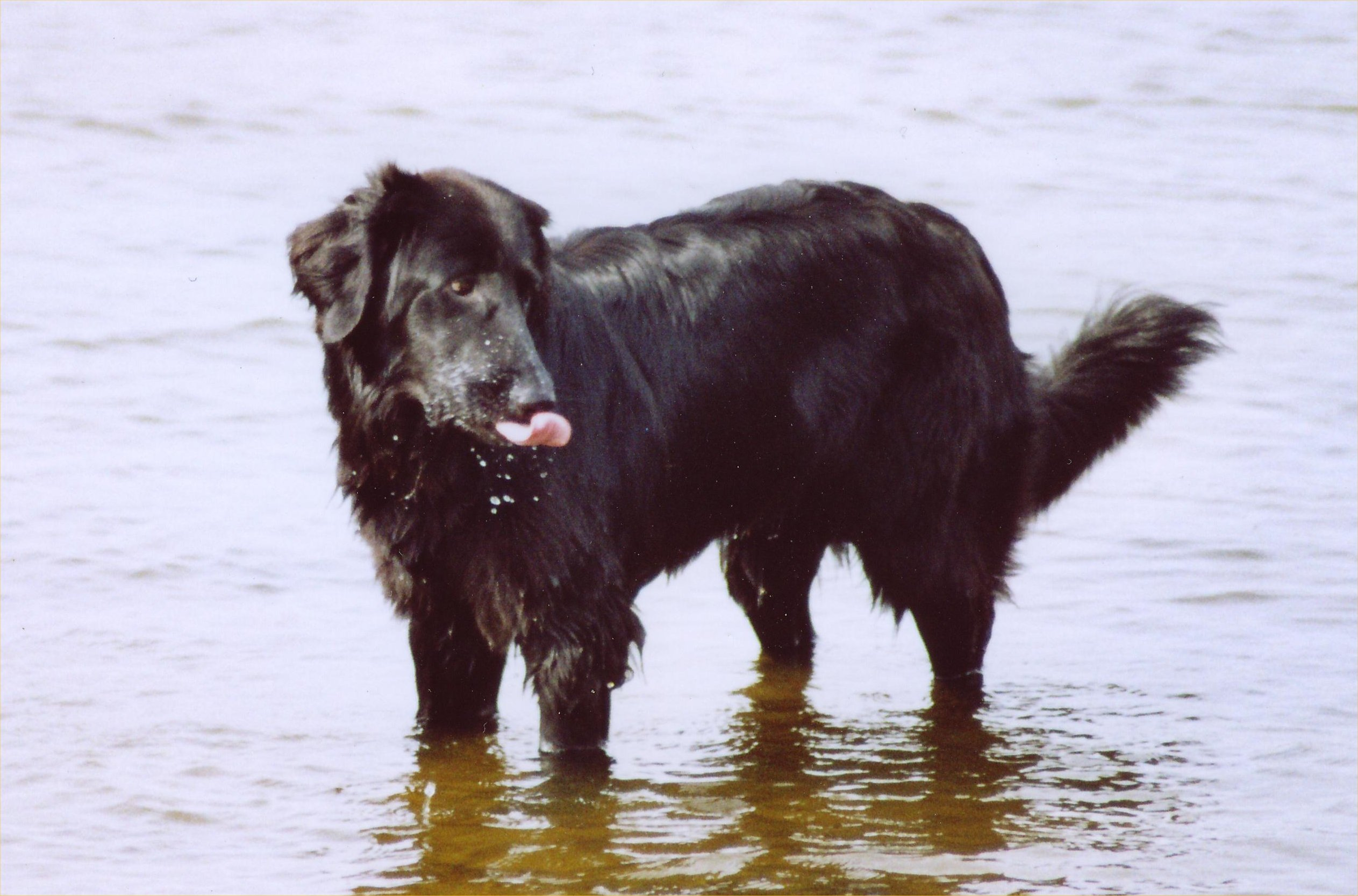 Schwarzer Hovawart „Ayke van de Flinthörners“ in Oeversee